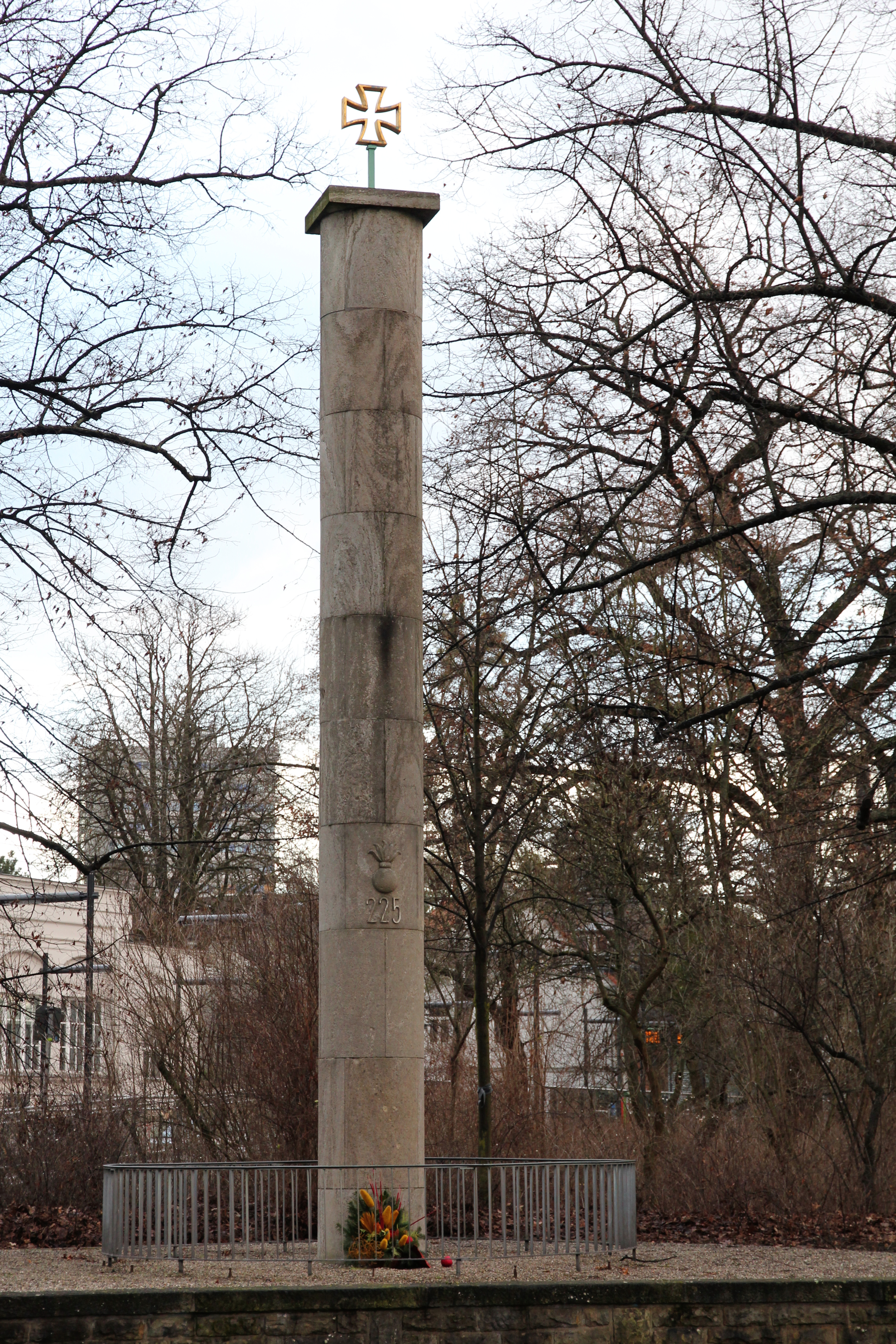 Kriegerdenkmal im Georgengarten in Hannover für die Gefallenen des Feldartillerie-Regiments Nr. 225